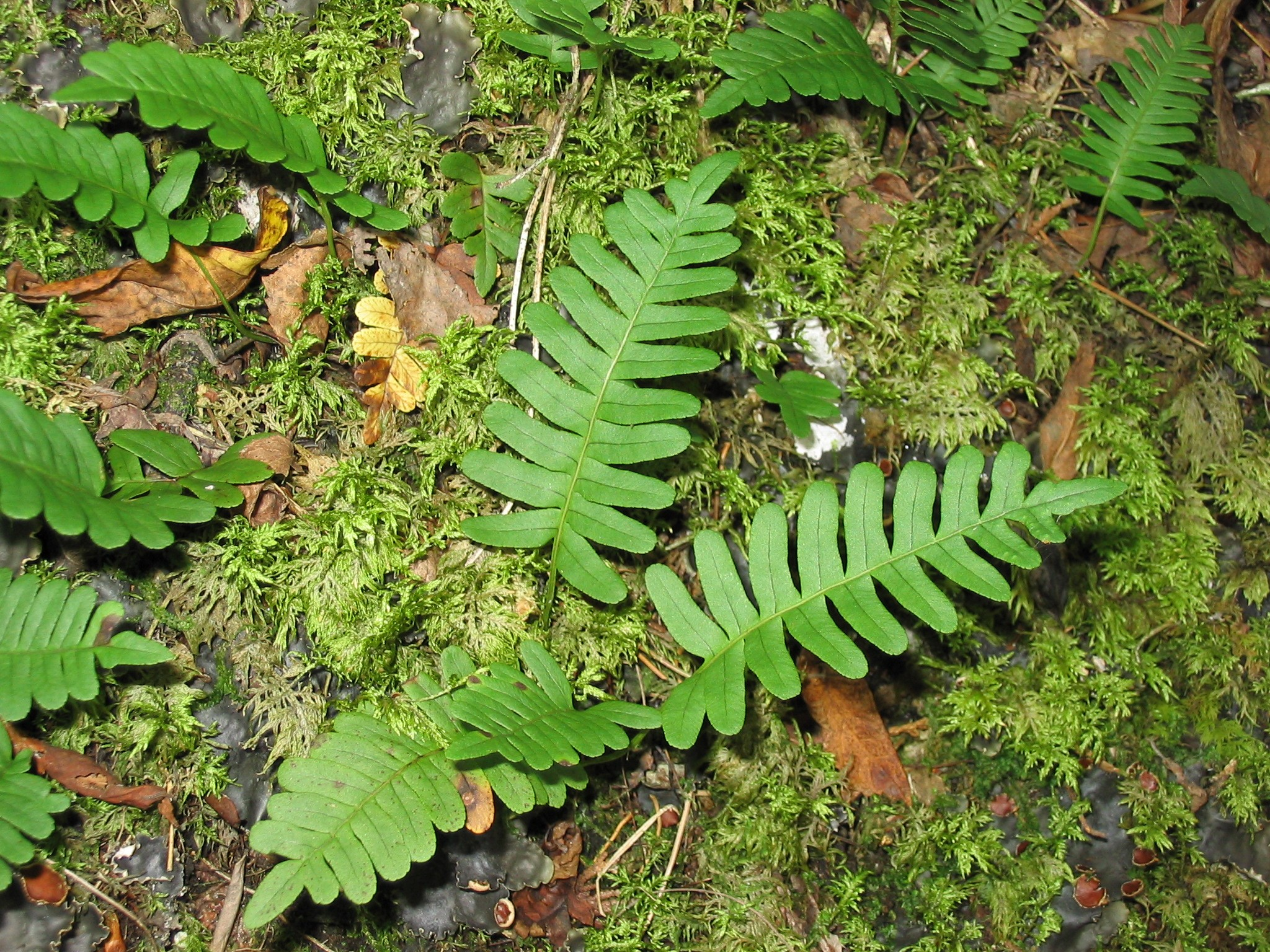 Polypodium virginianum 5-eheep